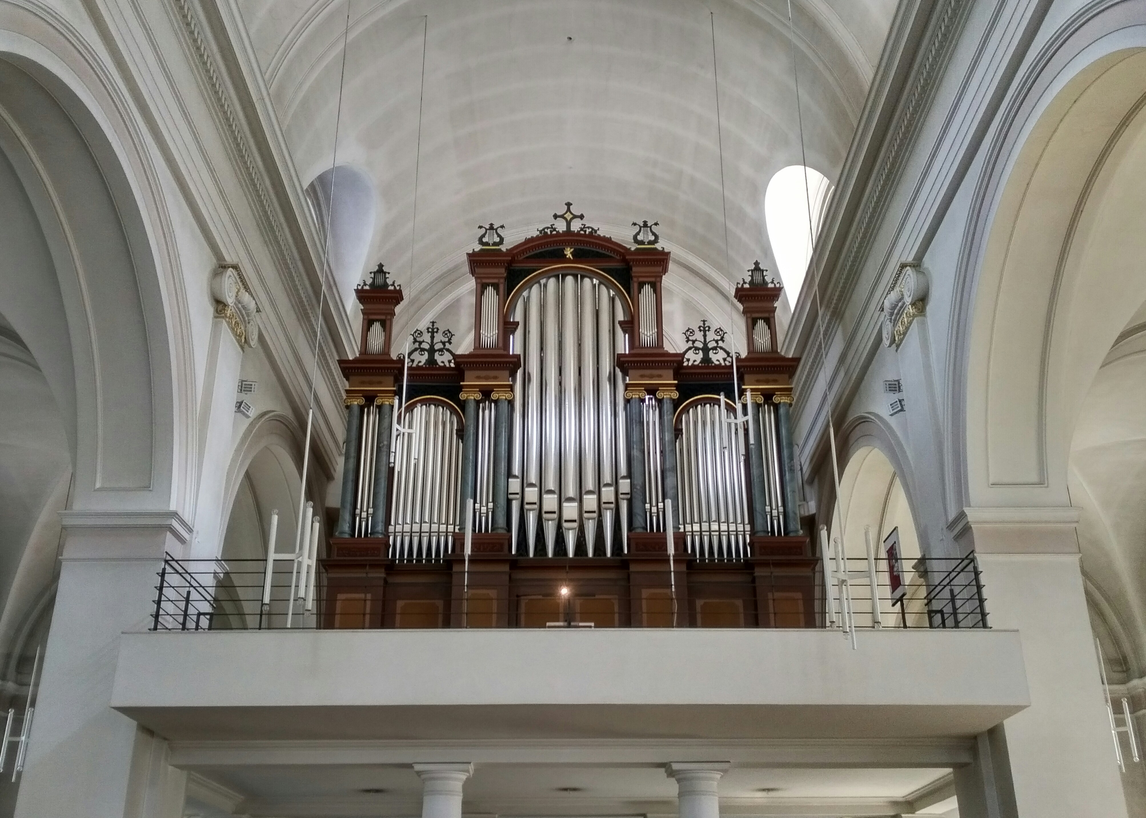 Orgel in der kath. Stadtpfarrkirche St. Maria in Schramberg. Die Orgel wurde 1844 als Opus 46 von Eberhard Friedrich Walcker gebaut.